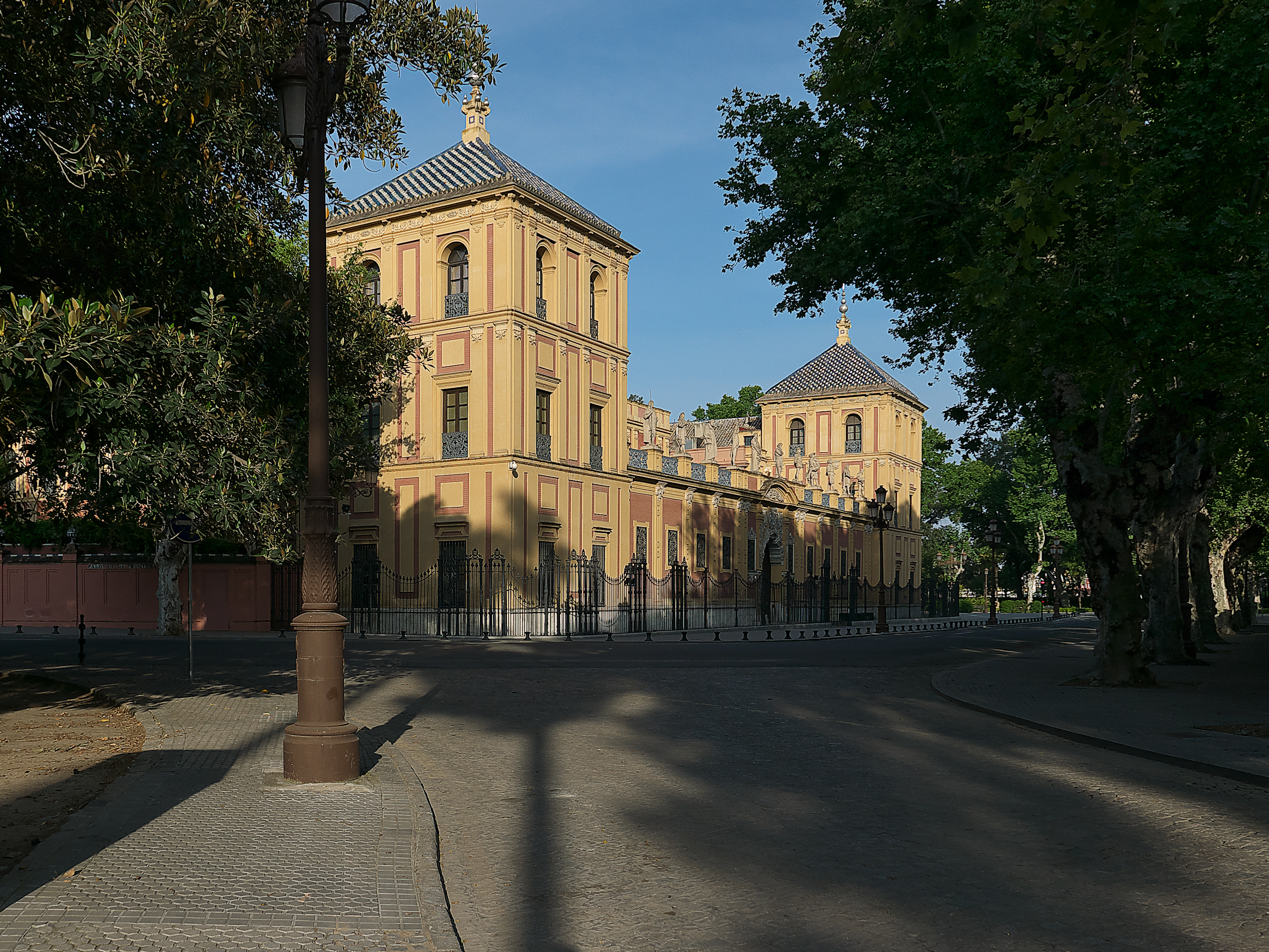 El palacio de los Duques de Montpensier ocupado por la Presidencia de la Junta.